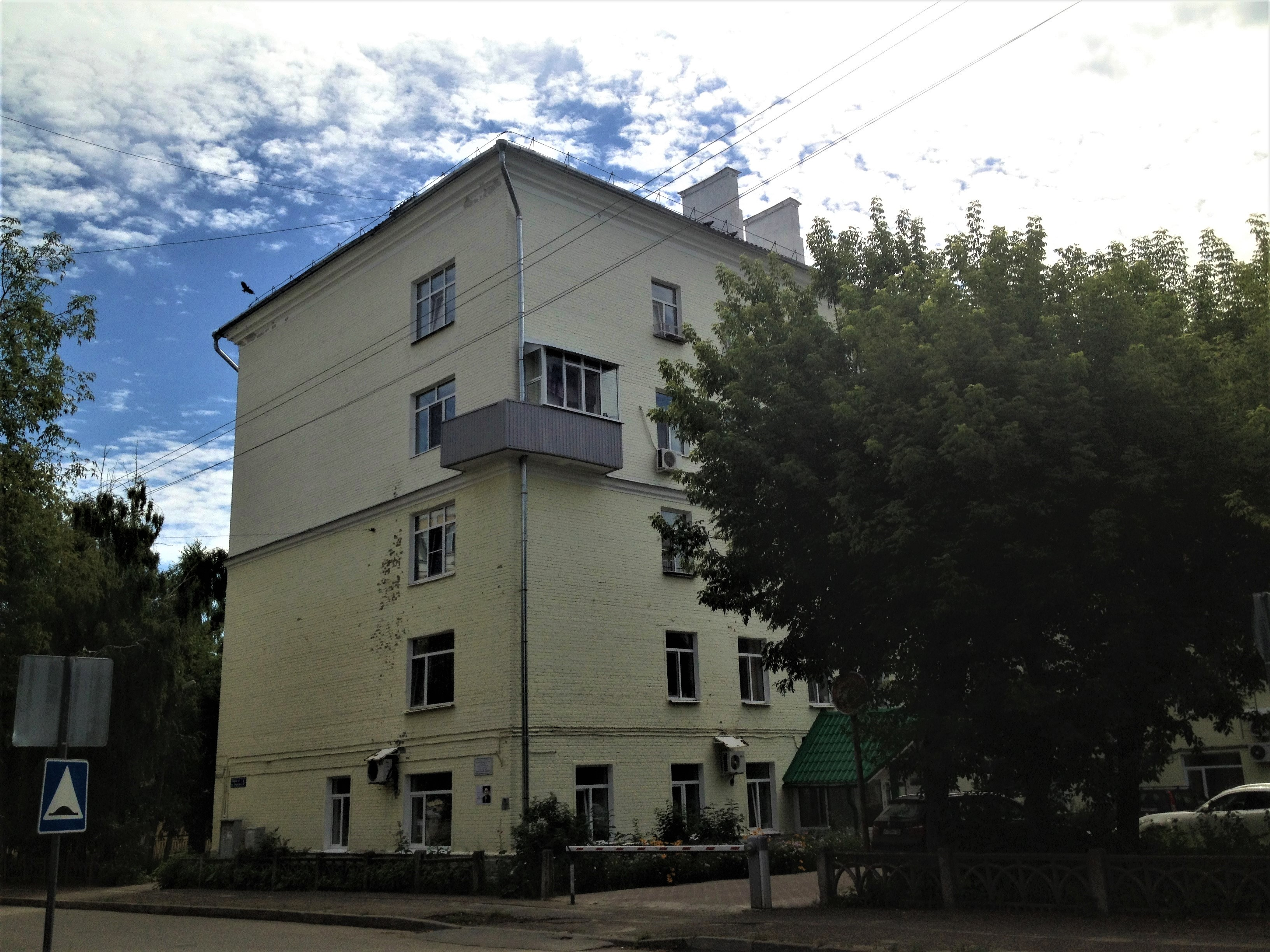 Улица Лядова, дом 5 (г. Казань).